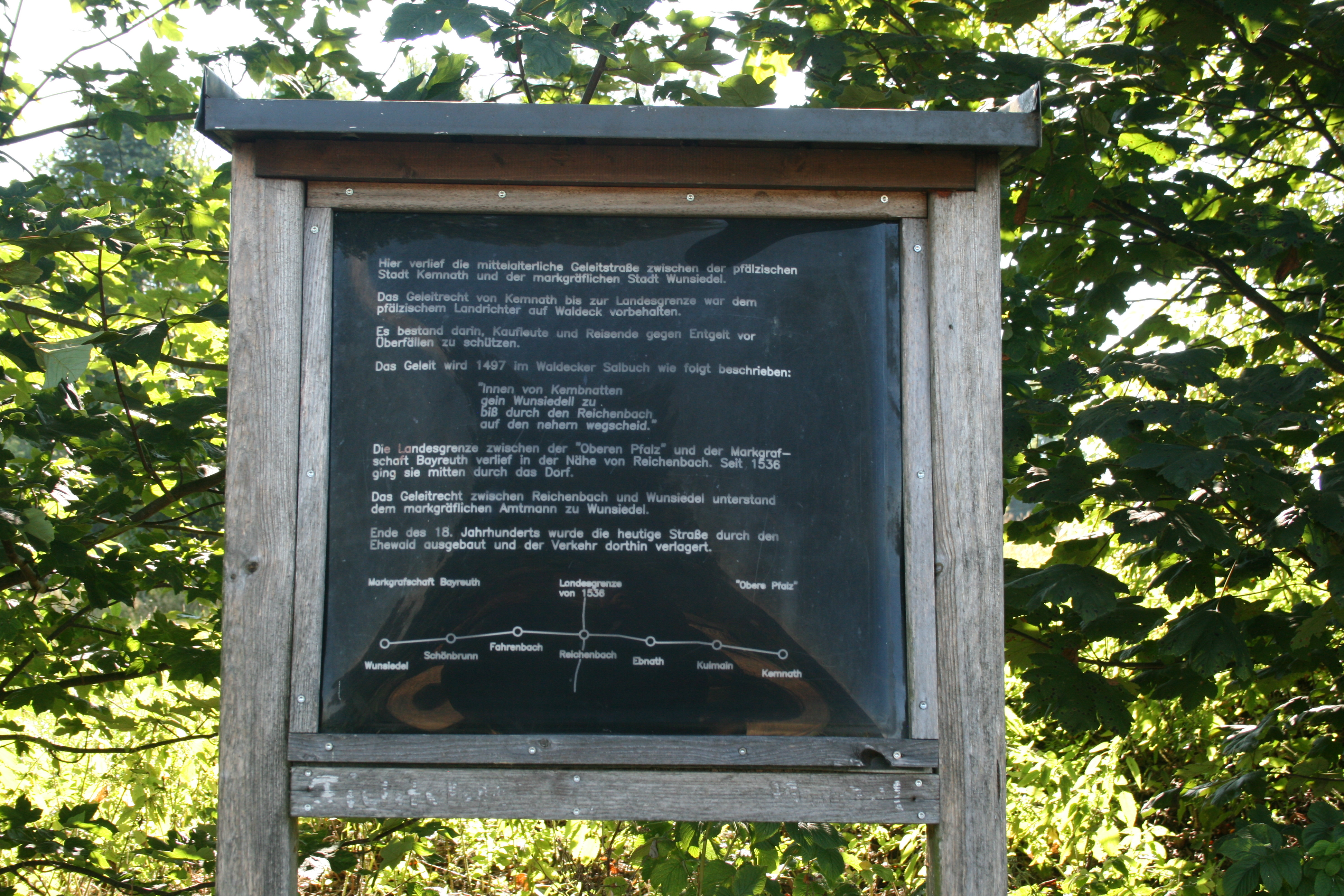 Informationstafel an der mittelalterlichen Geleitstraße Hohenbrand, Nagel